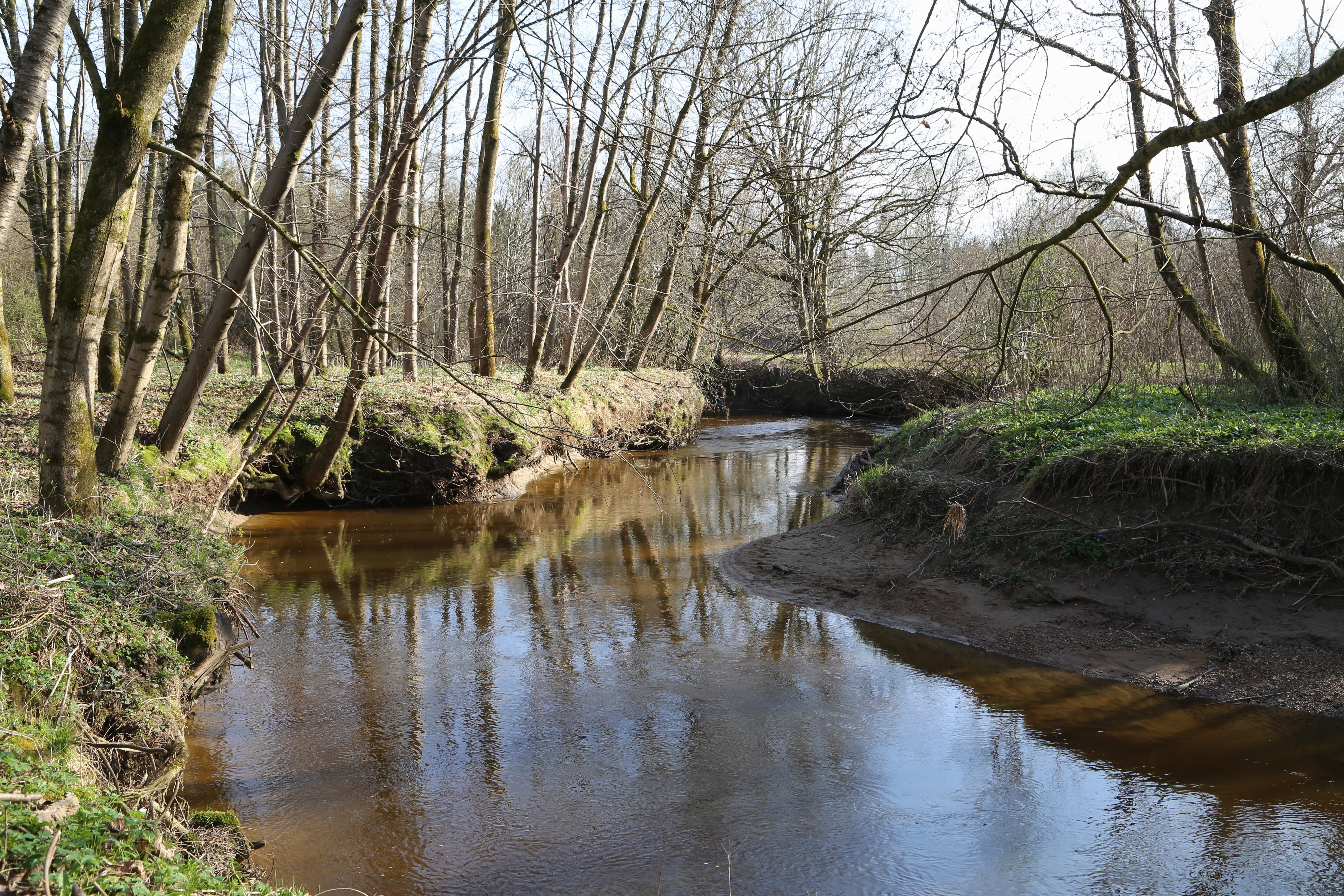 Kaltenbach im Naturschutzgebiet Kalten, Kolbermoor, NSG-00347.01